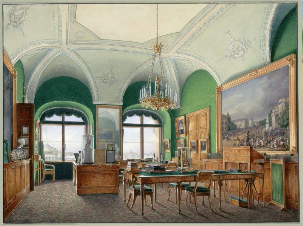 Большой кабинет императора Николая I